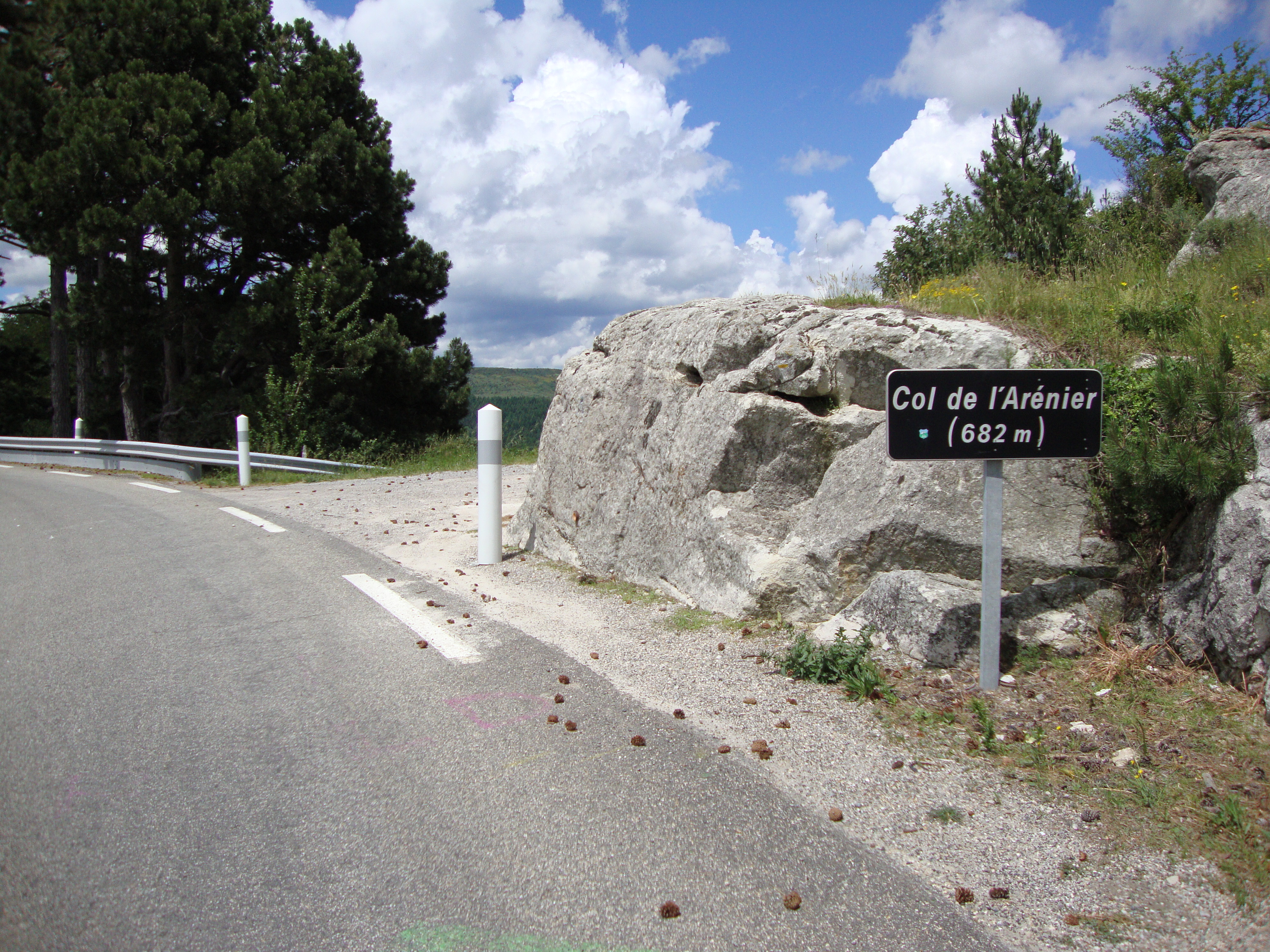 St.Priest (Ardèche, Fr) Col de l'Arénier